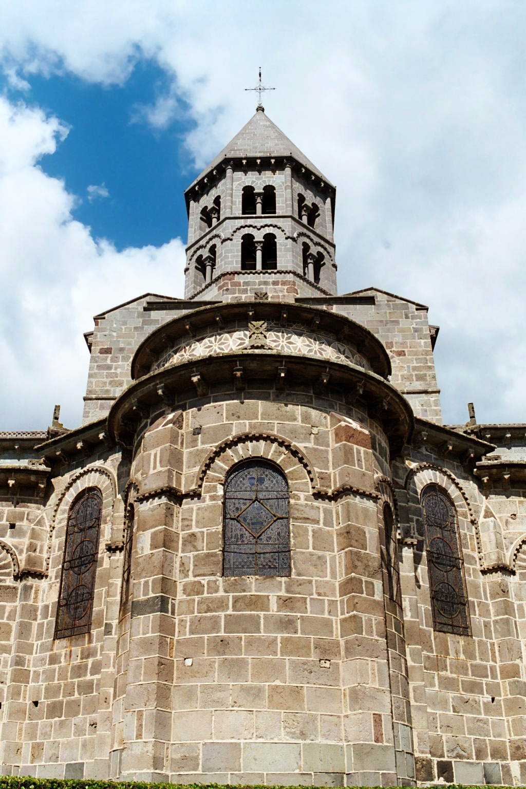 France - Auvergne - Puy-de-Dôme - Église de Saint-Nectaire